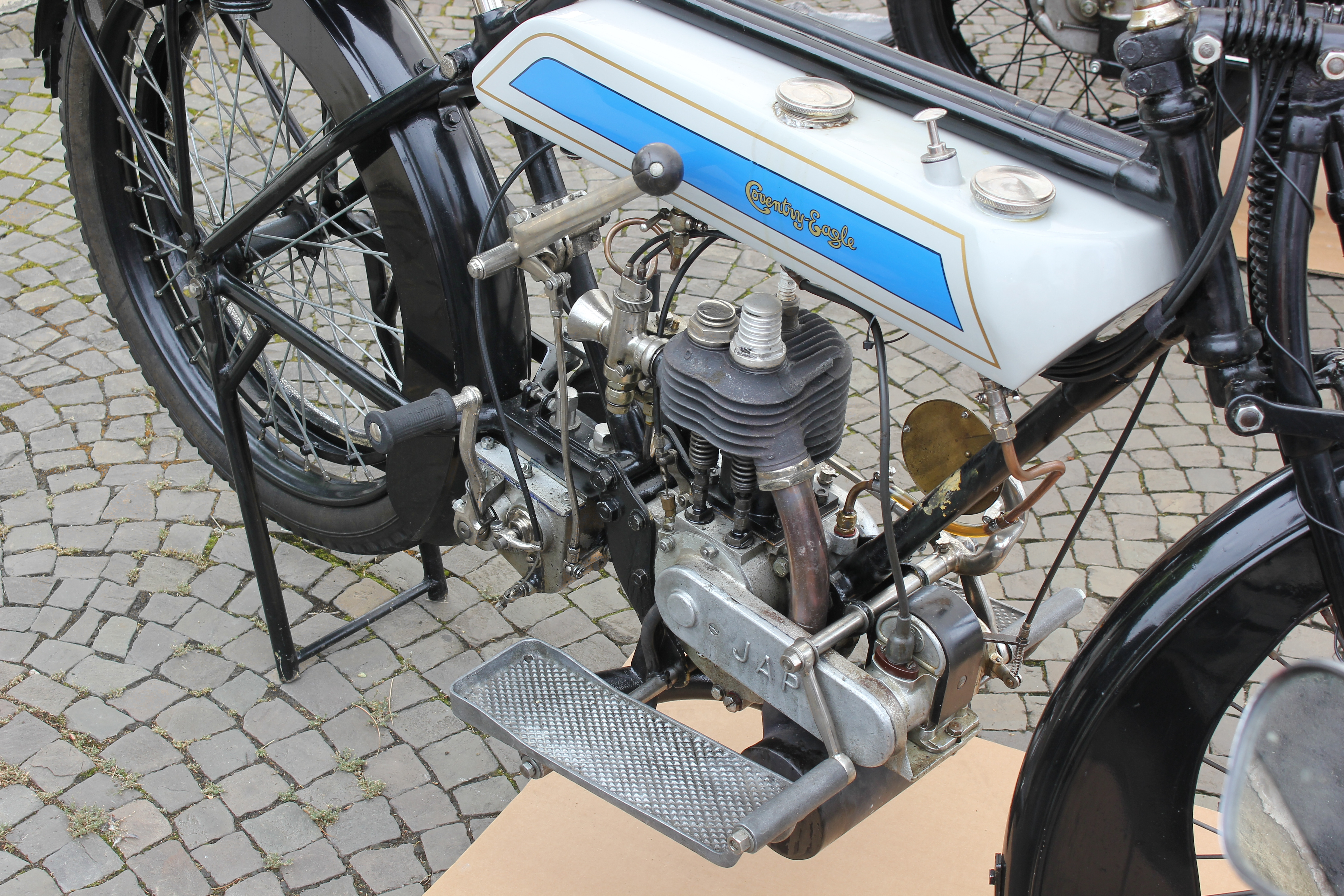 Coventry-Eagle, Baujahr 1920, seitengesteuerter Einzylinder-J.A.P.-Motor, 300 cm³, fotografiert bei der food rallye in Neuwied)